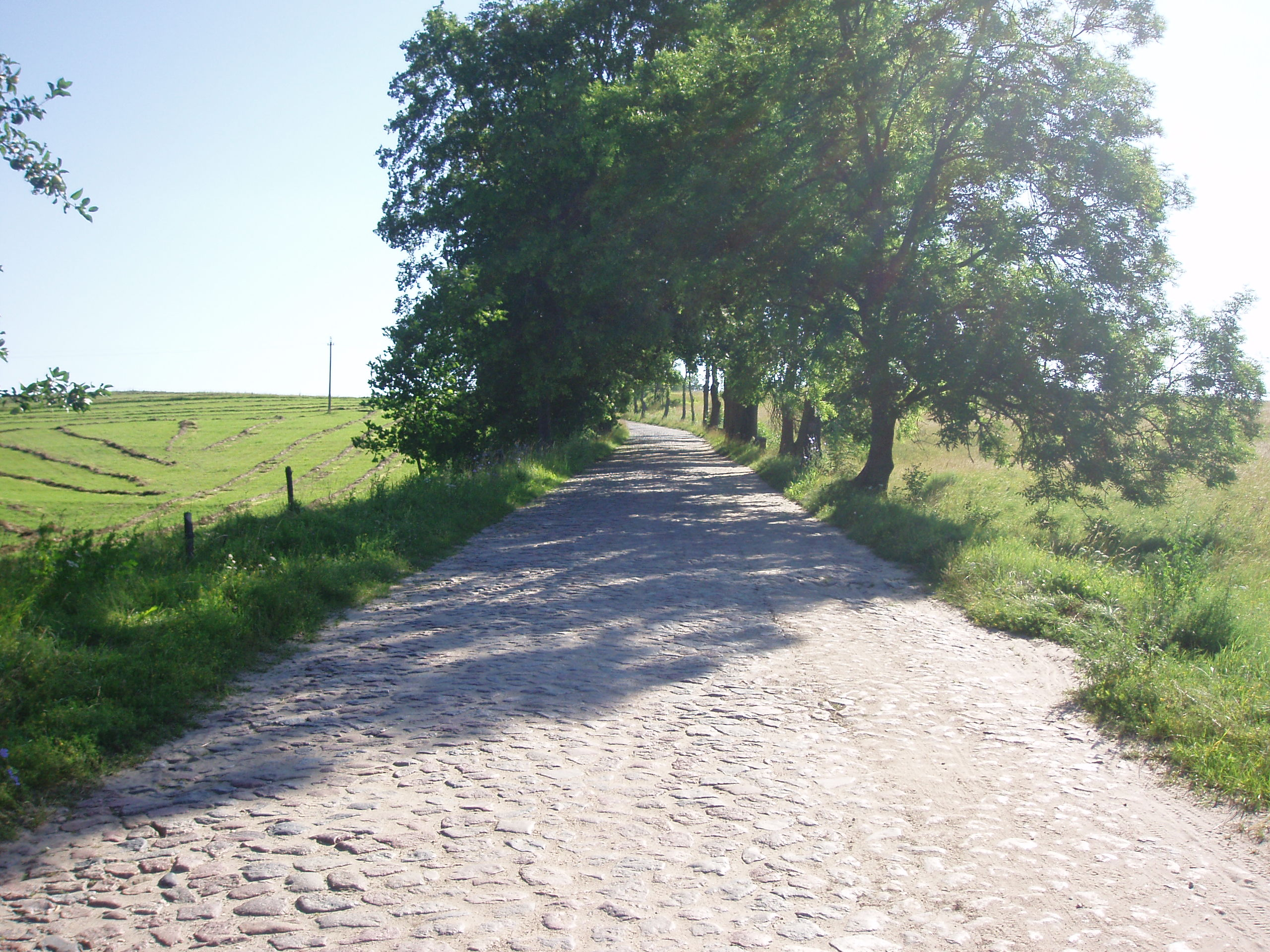 Brukowana dorga do Tylkowa (od strony południowej)